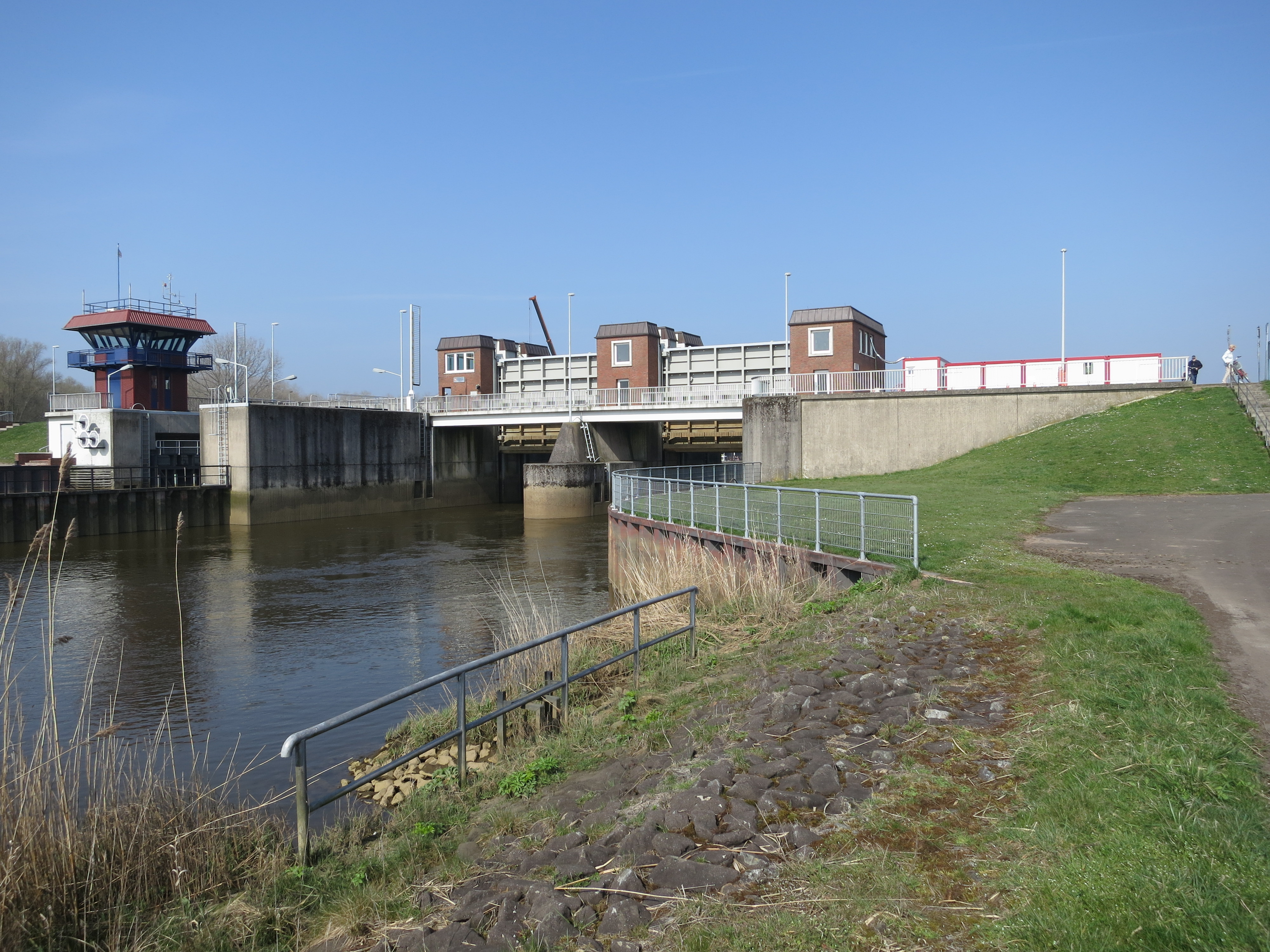 Das Ochtumsperrwerk an der Landesgrenze von Niedersachsen zu Bremen von Bremen-Seehausen aus gesehen